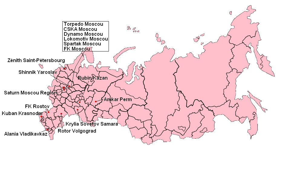 Participants à la Premier League 2004.